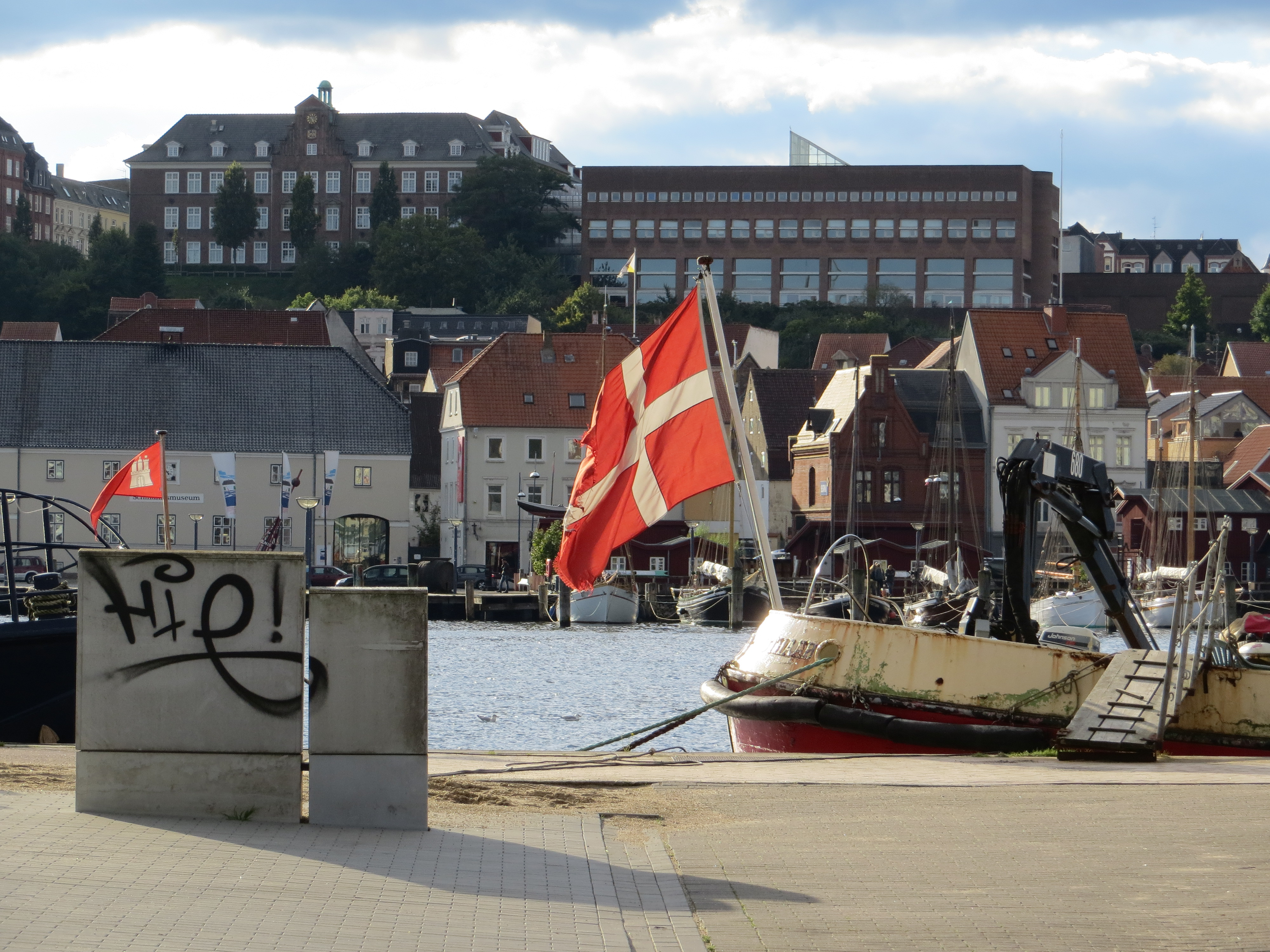 Schiff im Hafen mit dänischer Fahne und der Duborg-Skolen im Hintergrund (Flensburg 2013), Bild 03